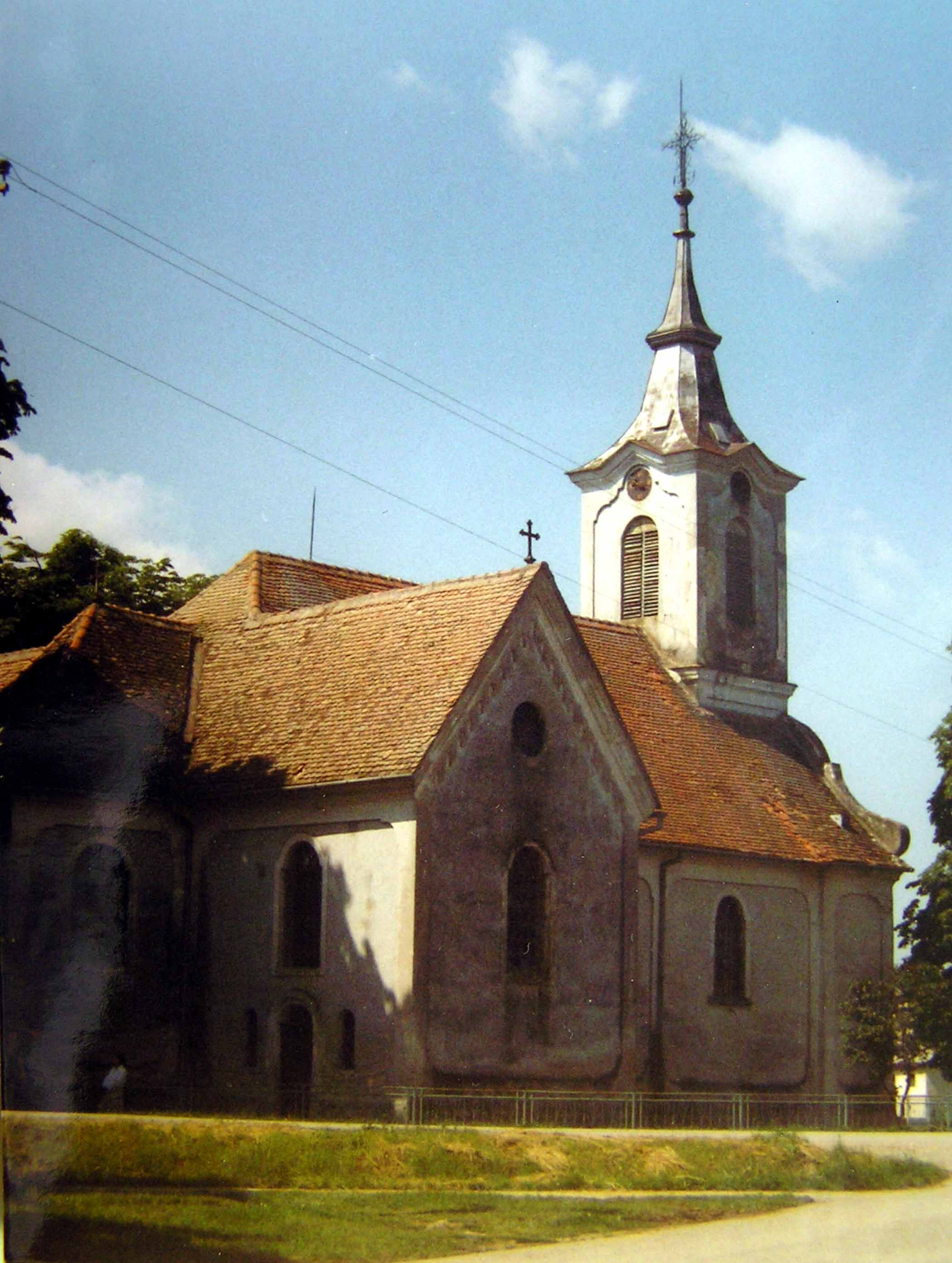 A kép a baranyabáni római katolikus templomot ábrázolja dél-keleti oldalról.